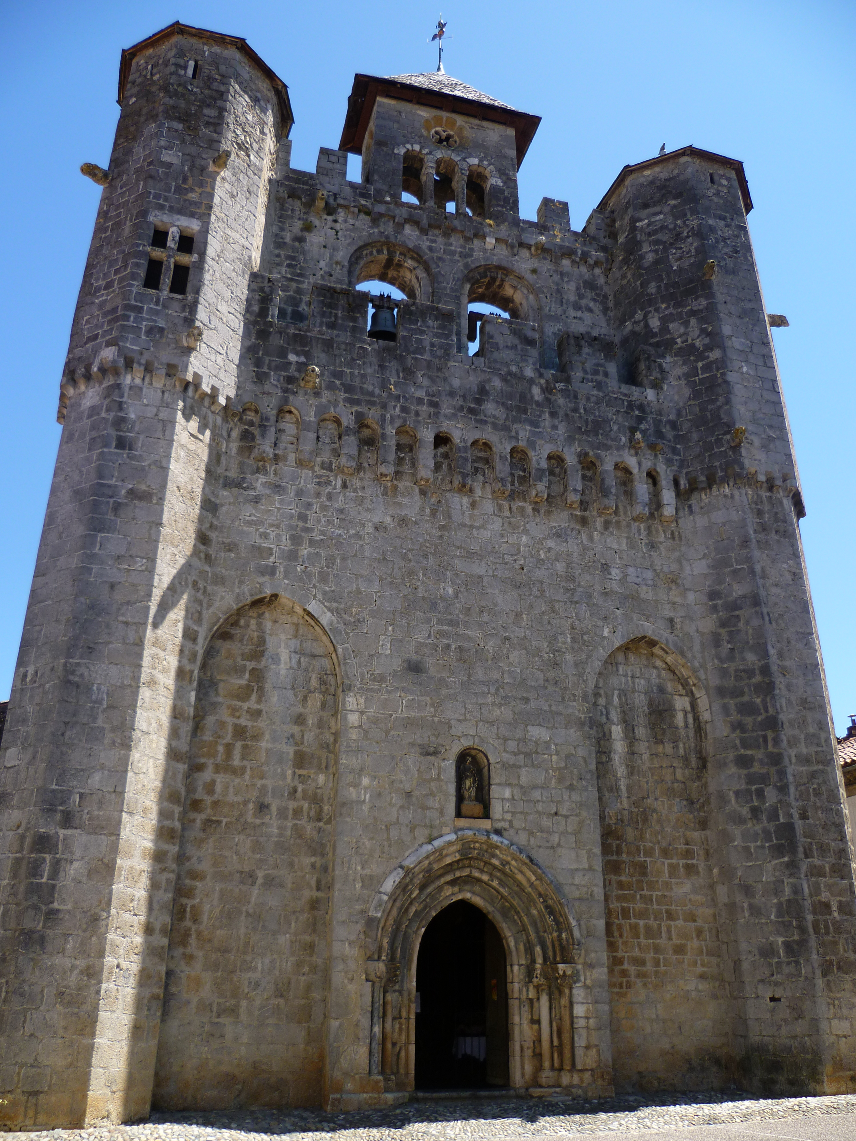 Montjoie-en-Couserans (Ariège, France) : L'église Notre-Dame-de-l'Assomption.